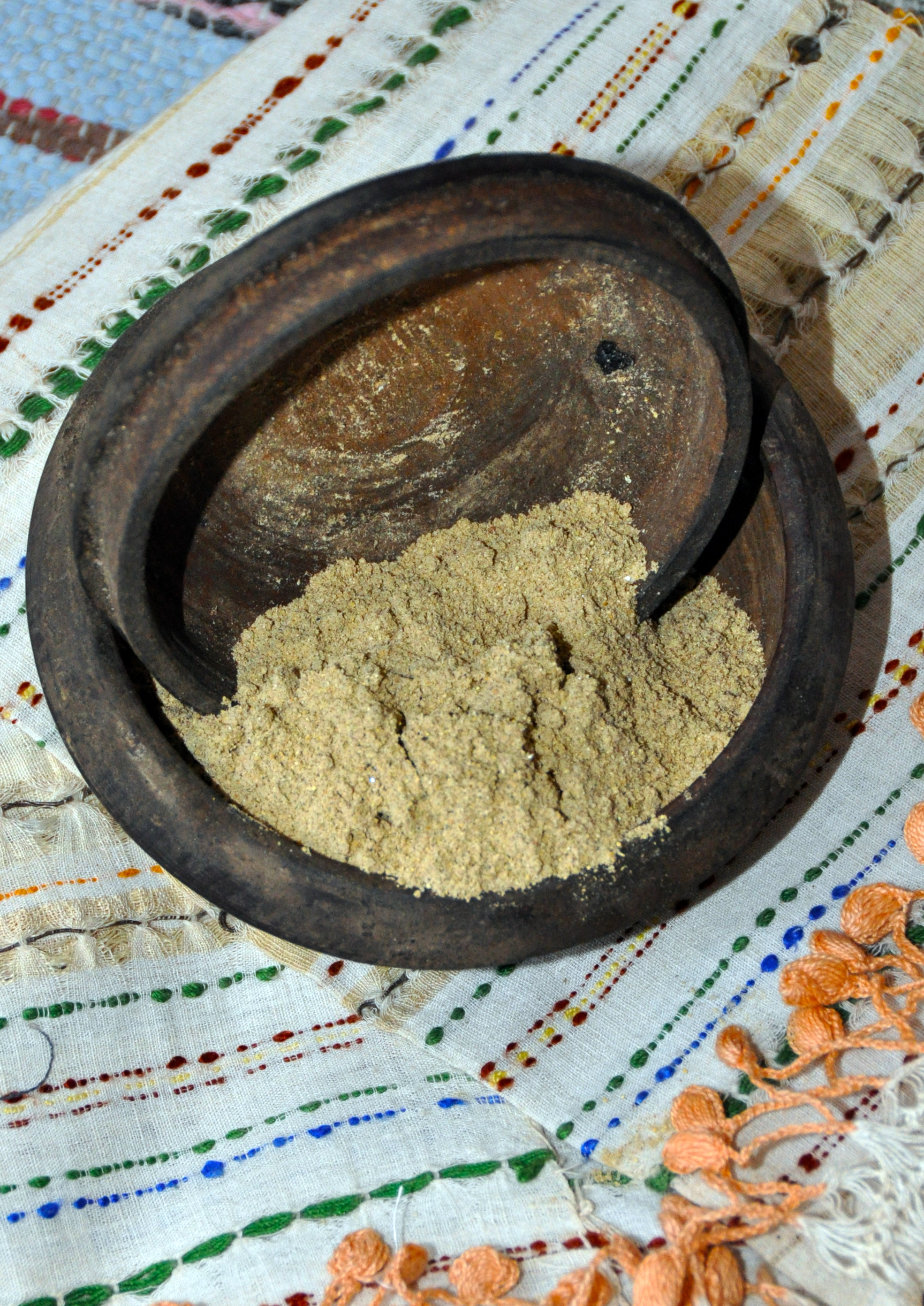 Кратовска К'цана сол